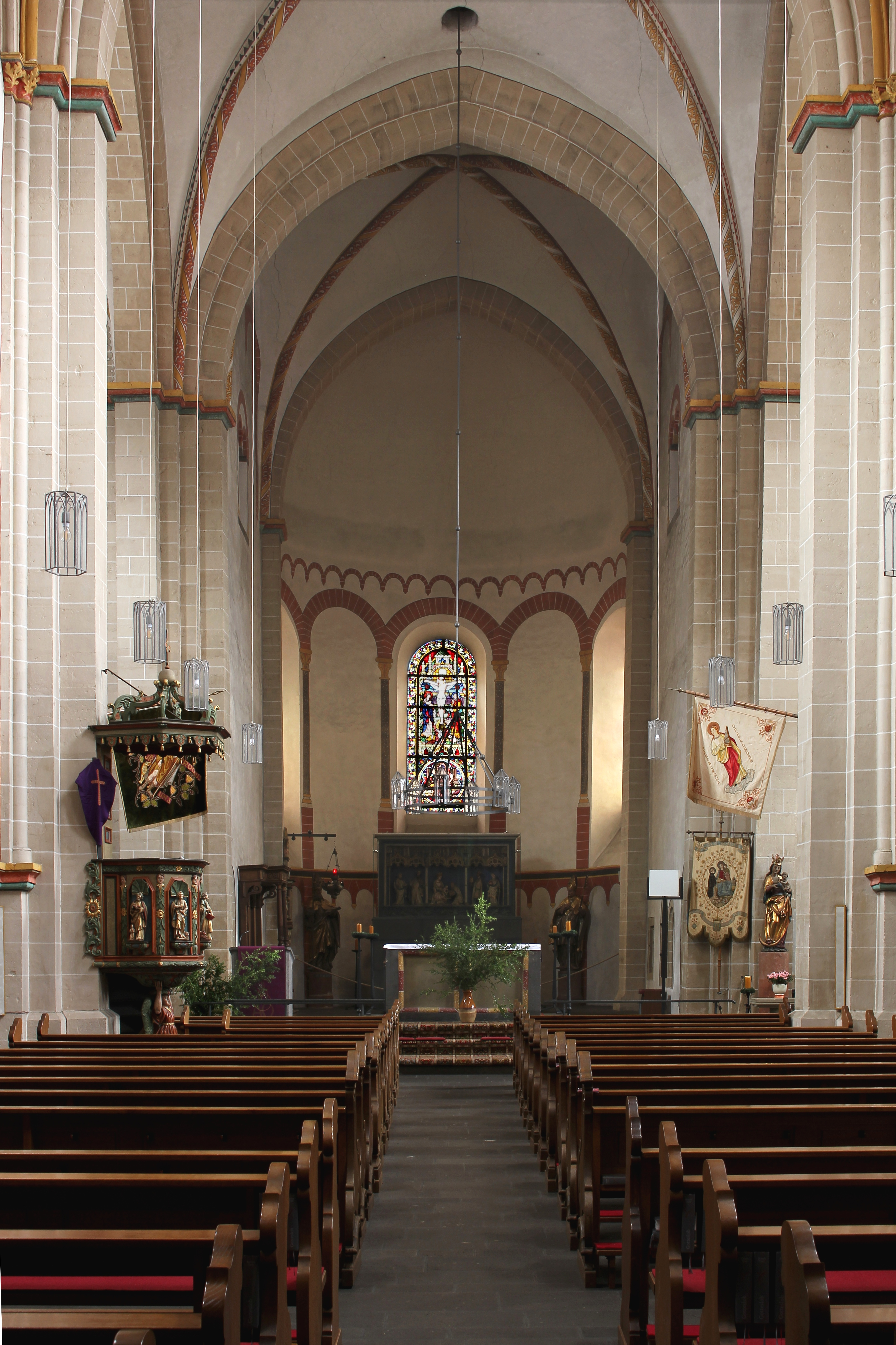 Ehemalige Stiftskirche St. Castor in Karden, Blick in den Ostchor